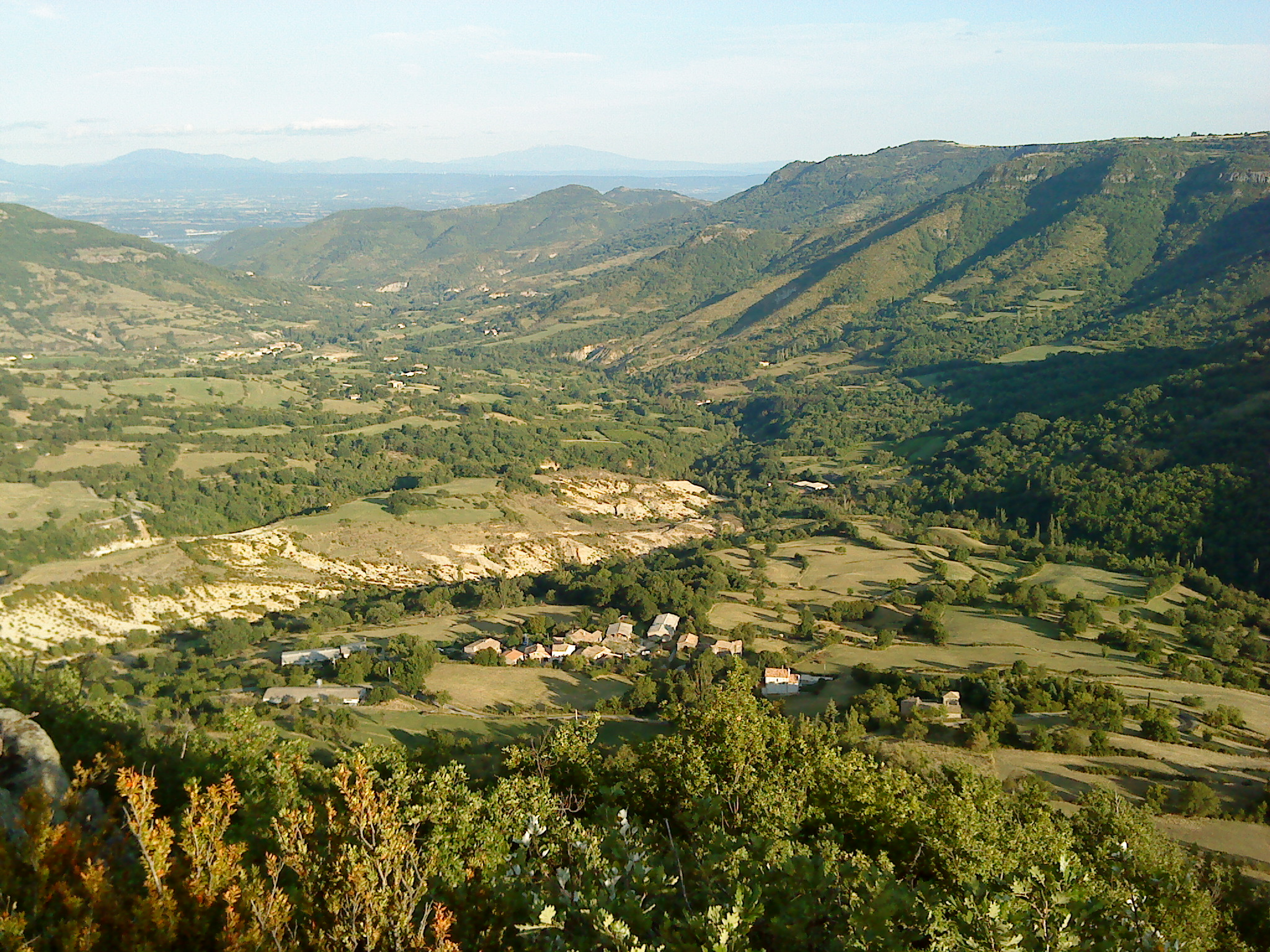 Quartier de Saint Pierre la Roche